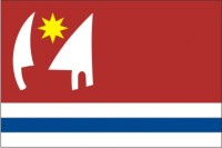 Stavenice (okres Šumperk)